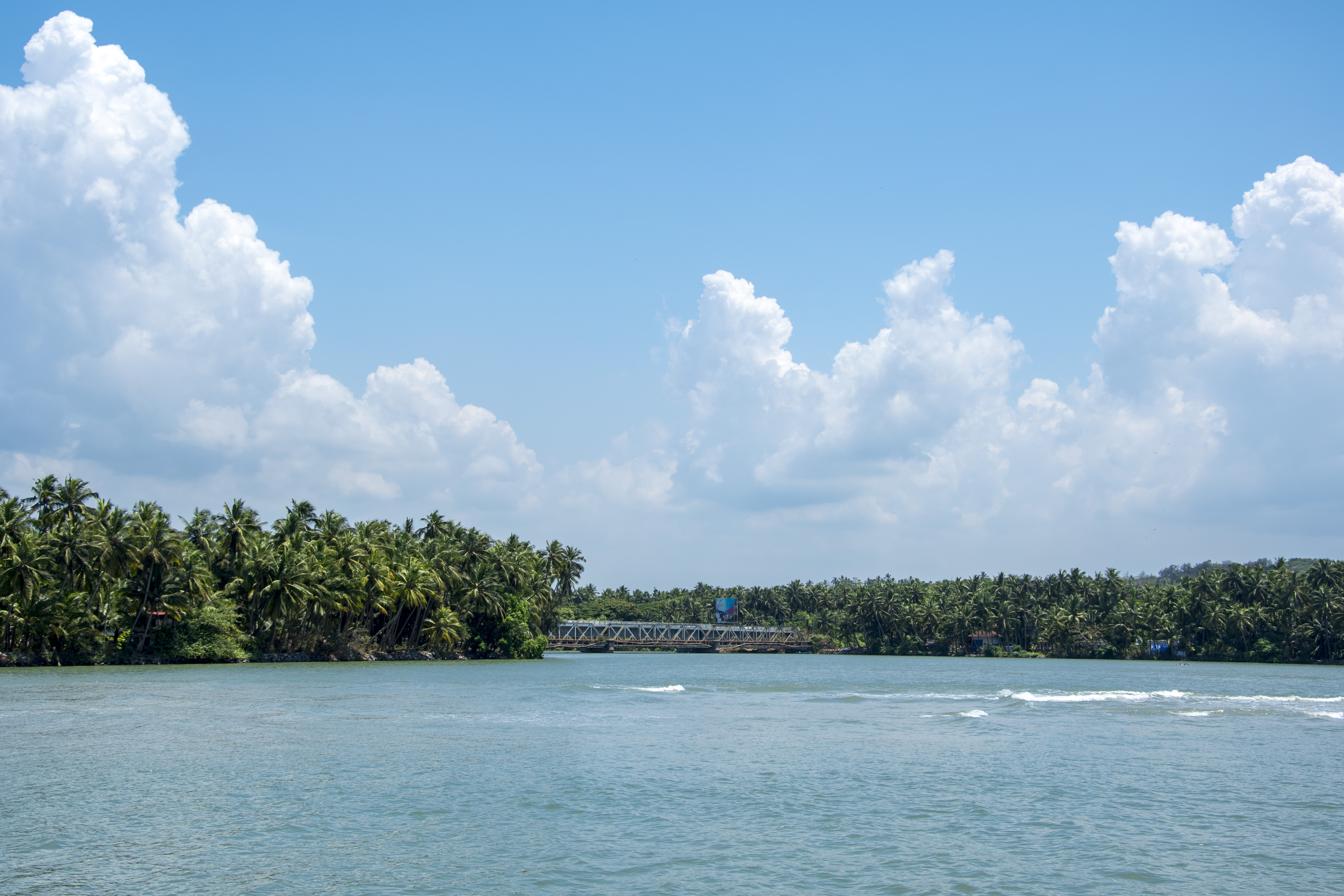 അഞ്ചരക്കണ്ടി പുഴയുടെ അഴിമുഖം